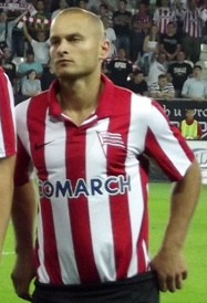 Zdjęcie zrobione podczas meczu pomiędzy Cracovią a Stomilem Olsztyn w Krakowie.